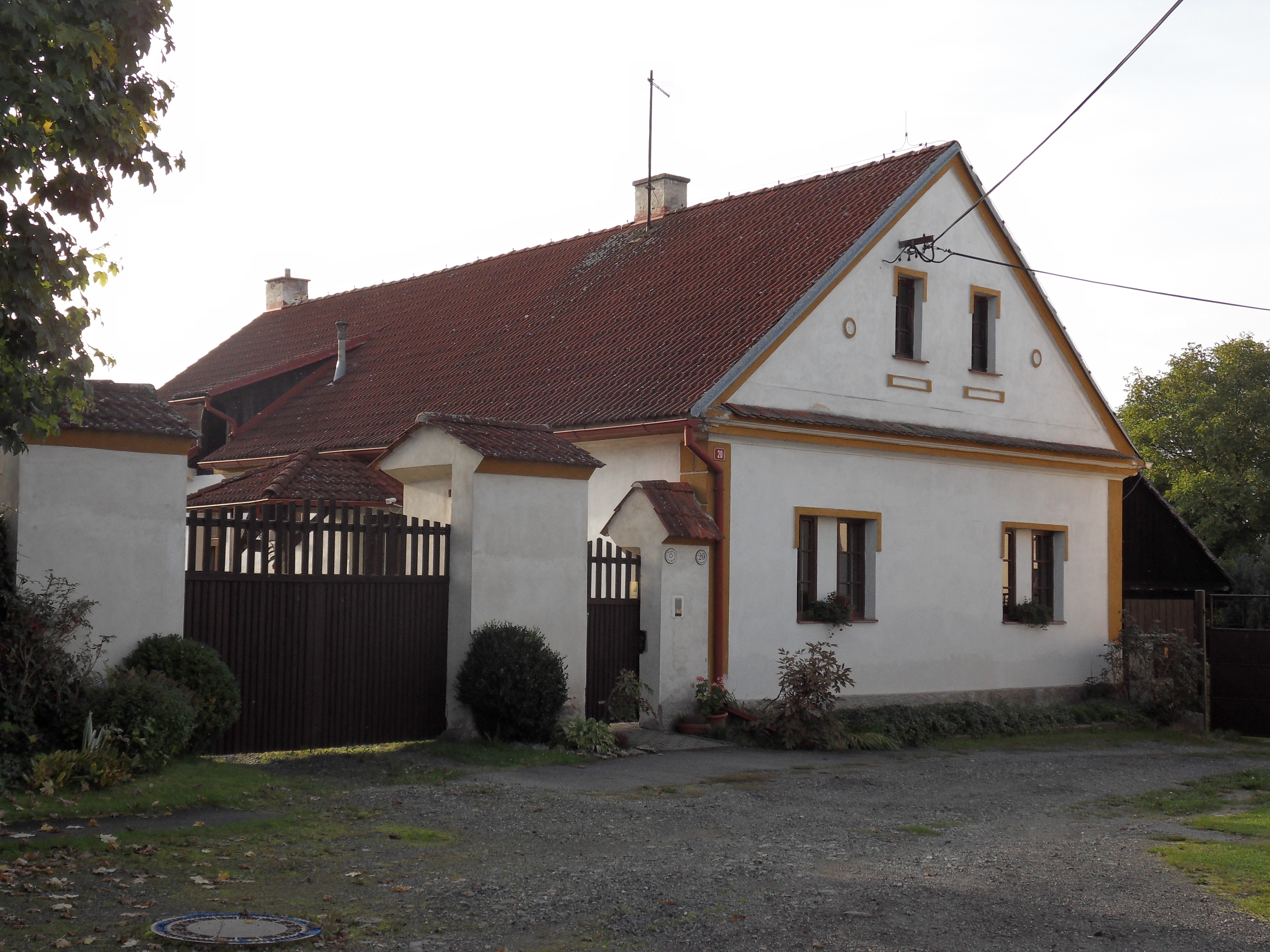 Usedlost čp. 20, Letkov 20, náves, Letkov.